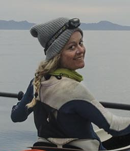 45 Días Sola En Kayak por el Mar de Cortés, México.